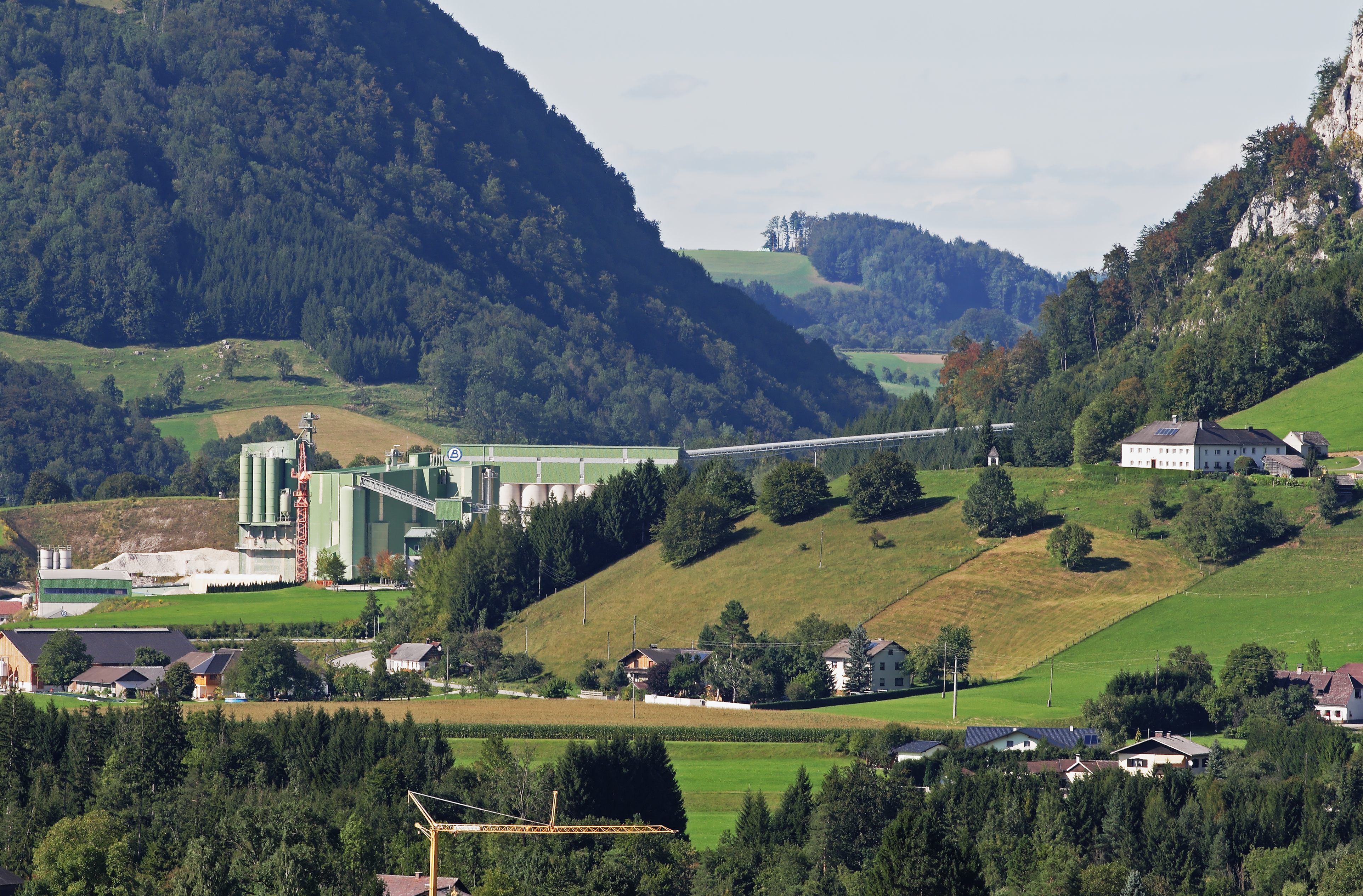 Blick auf das Bernegger-Werk in Molln